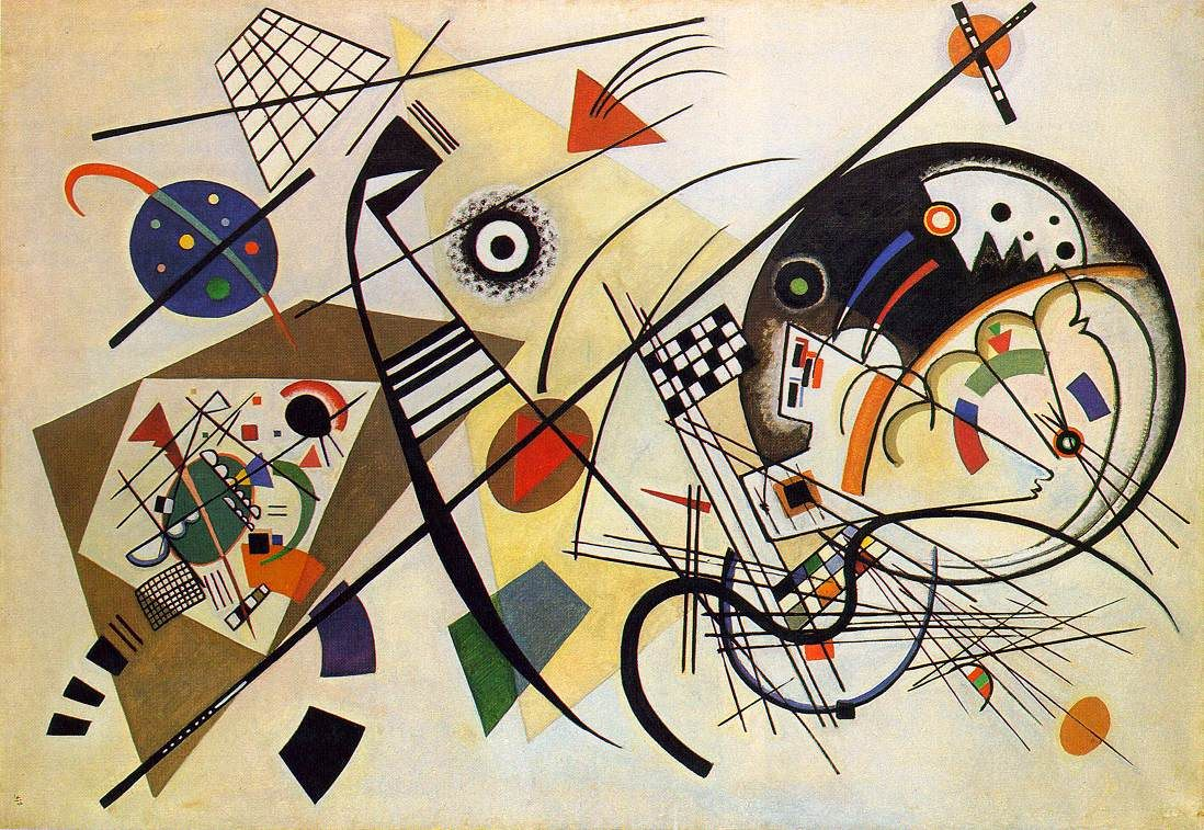 Поперечная линия, 1923, Василий Кандинский